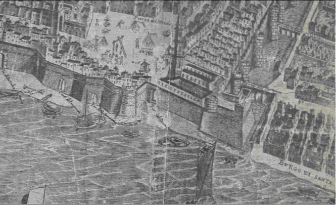 Castello del Carmine 1629- Napoli